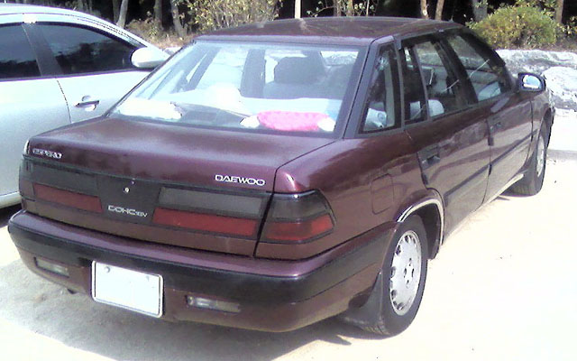 1991년식 대우 에스페로 후면